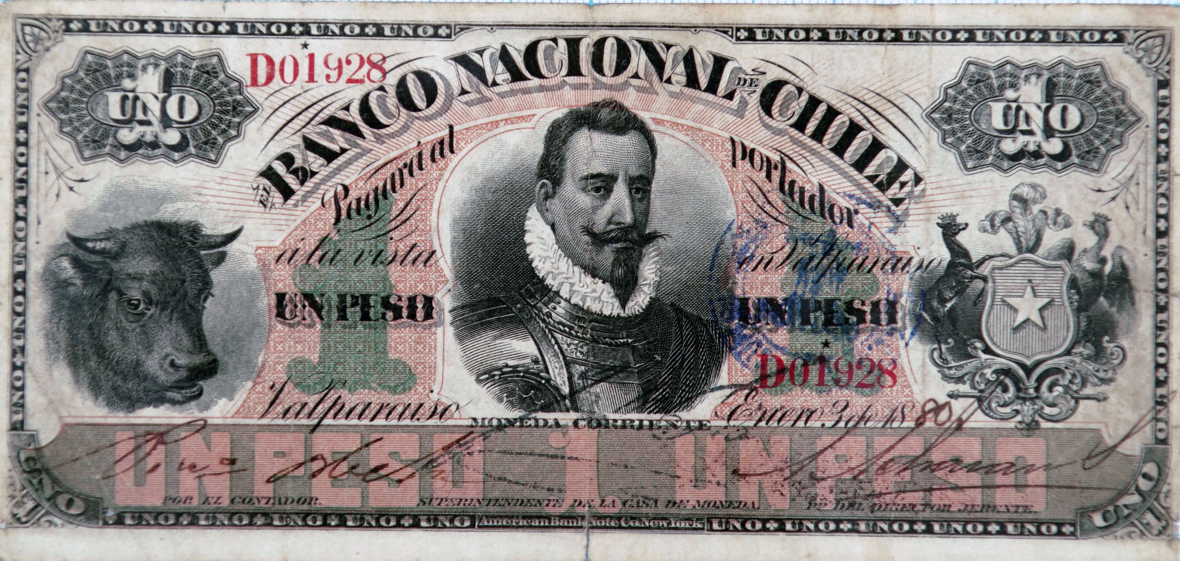 Banco Nacional